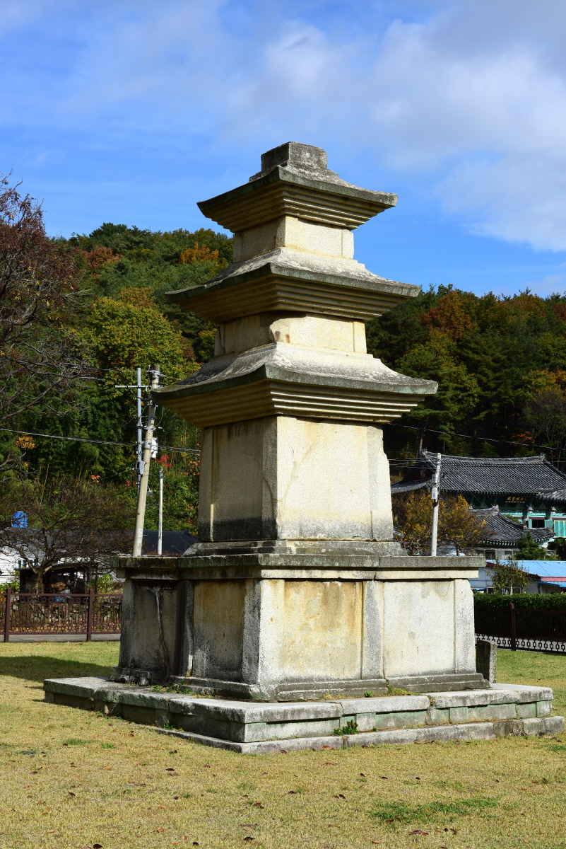 보물 제382호 울주 청송사지 삼층석탑 (蔚州 靑松寺址 三層石塔) - 측면 전경